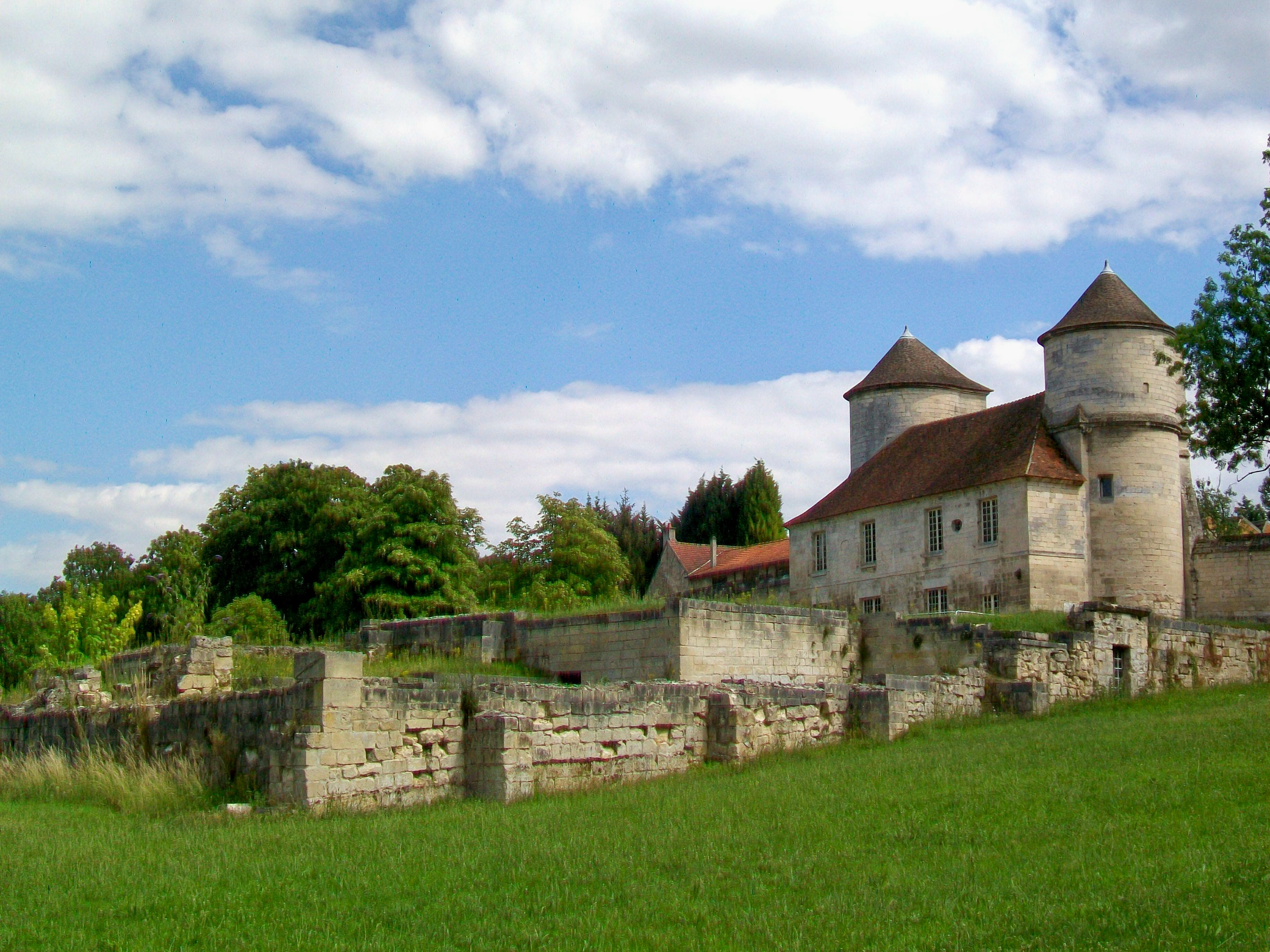 Ancien manoir de Philippe le Bel : vestiges mis à jour par des fouilles archéologiques, permettant de reconstituer le plan de l'édifice démoli en majorité au XVIIIe siècle.